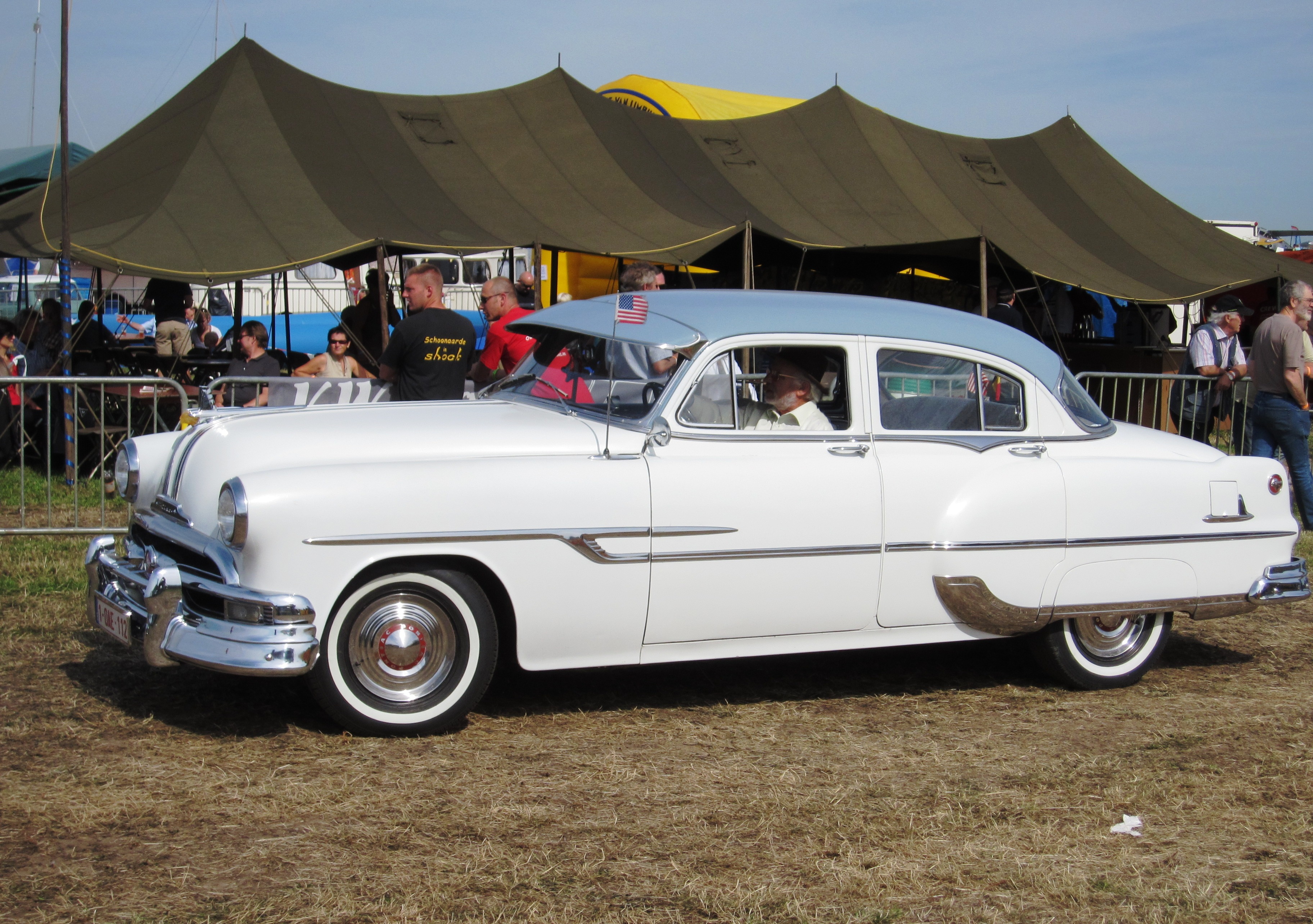 Pontiac Chieftain Deluxe sedan (1953)